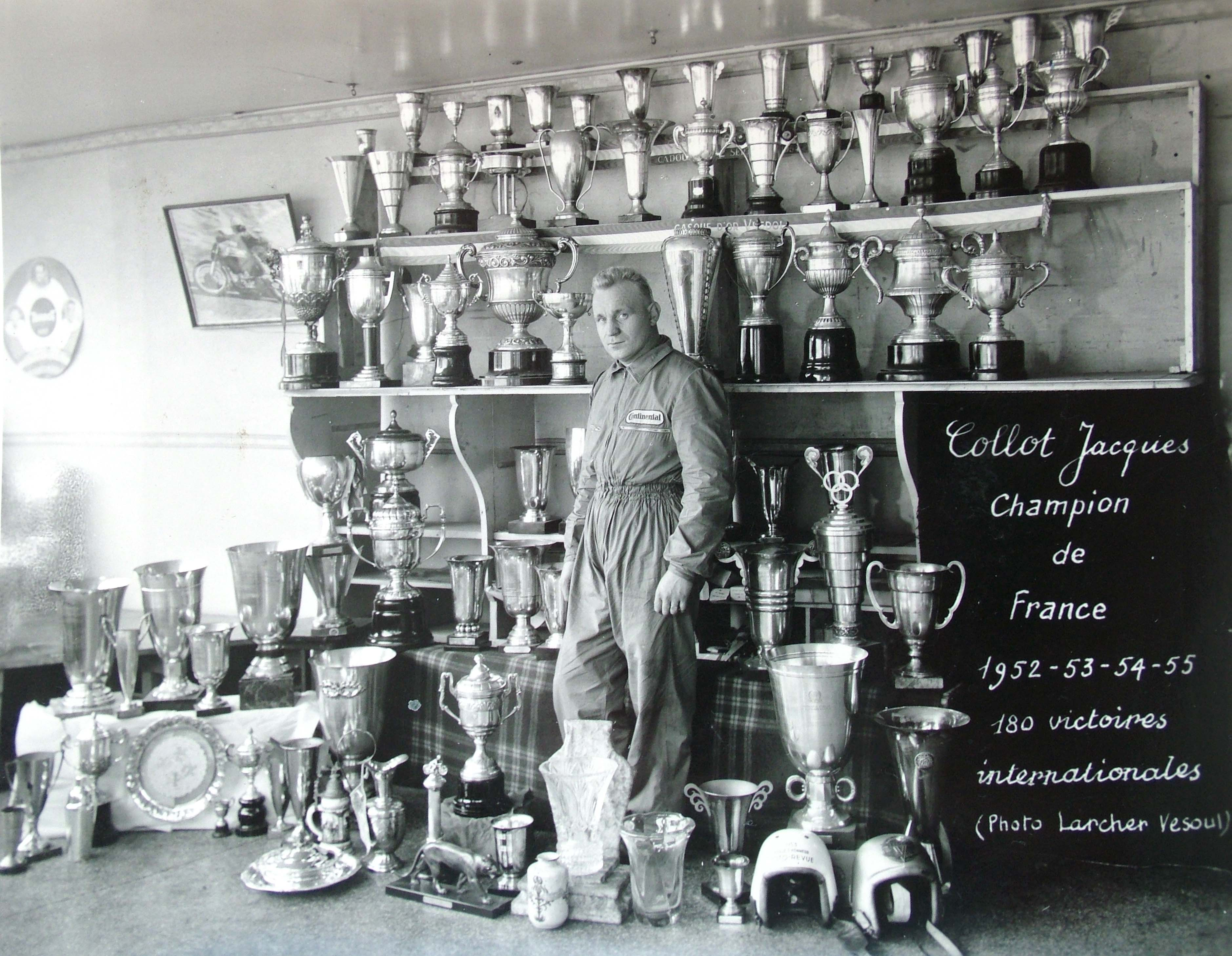 jacques Collot et ses coupes jusqu'en 1955. Photo Larcher